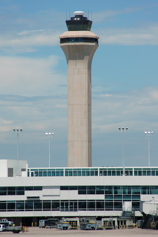 Tower des Flughafens Denver